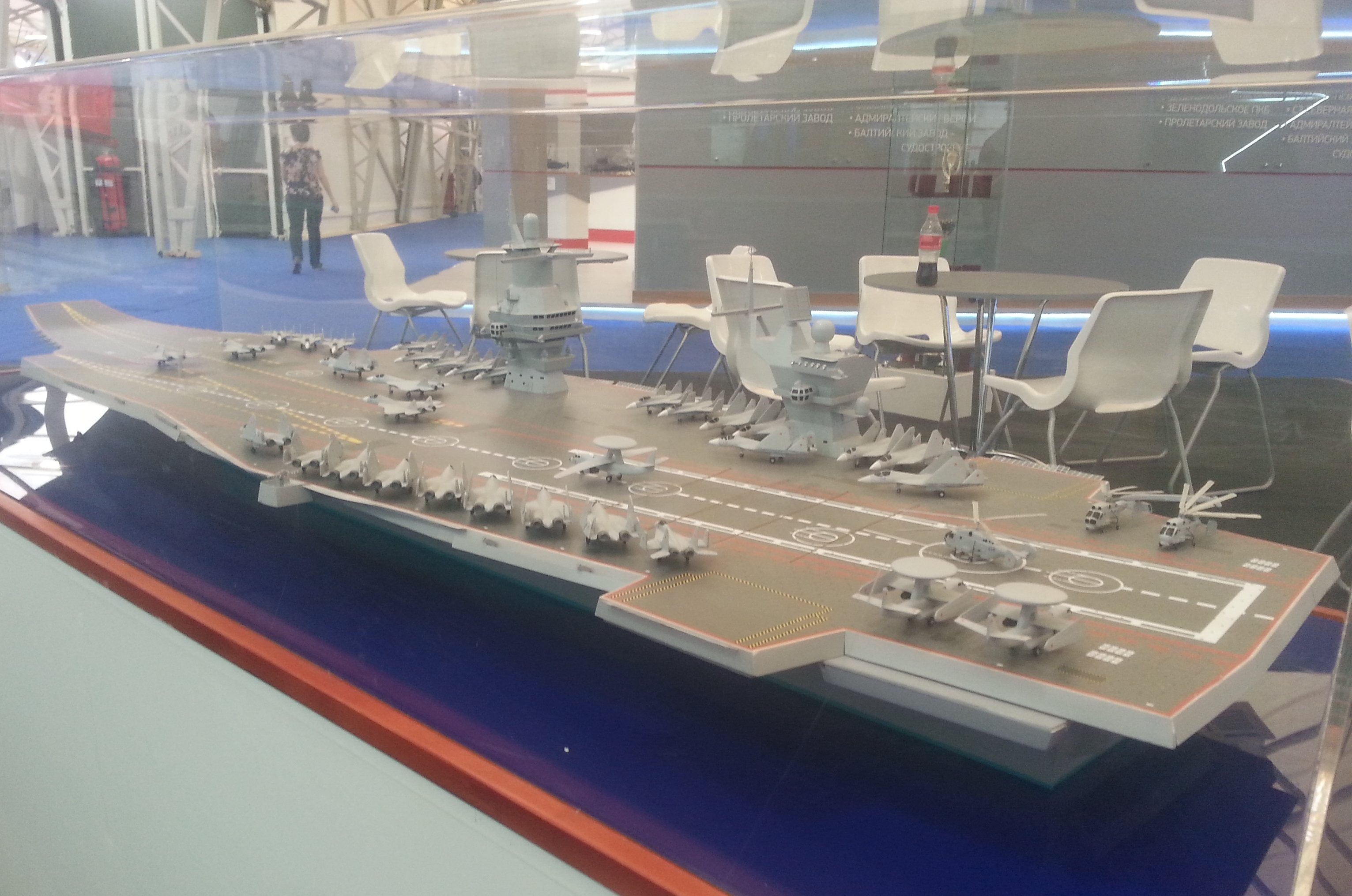 Макет авианосца проекта 23000Е на выставке «Армия 2015»